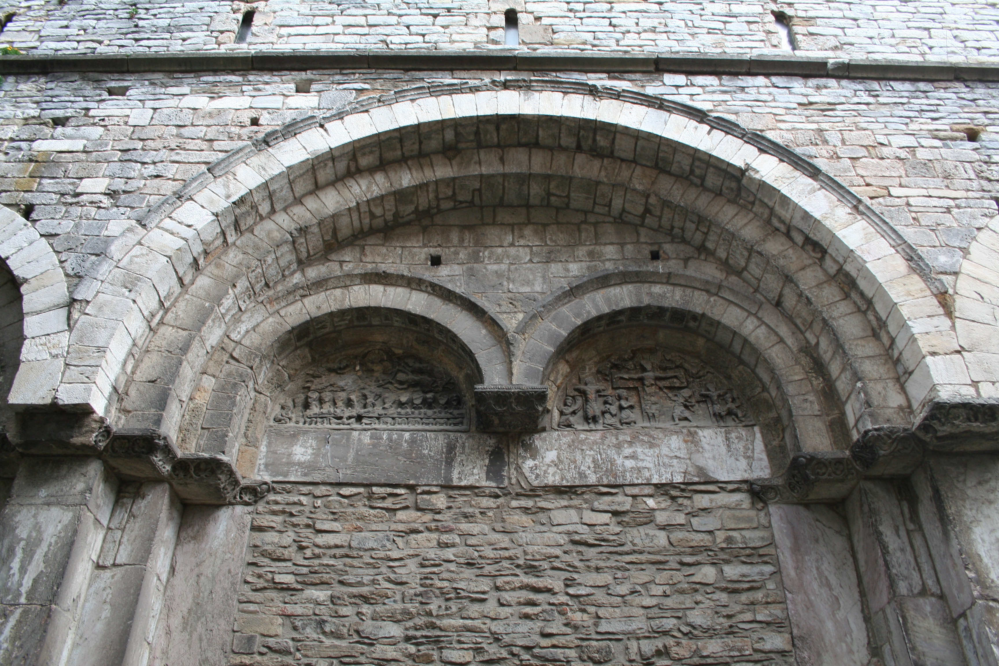 Saint-Pons-de-Thomières (Hérault)- cathédrale - portail - à gauche : la cène et l'ascension - à droite, la crucifixion.